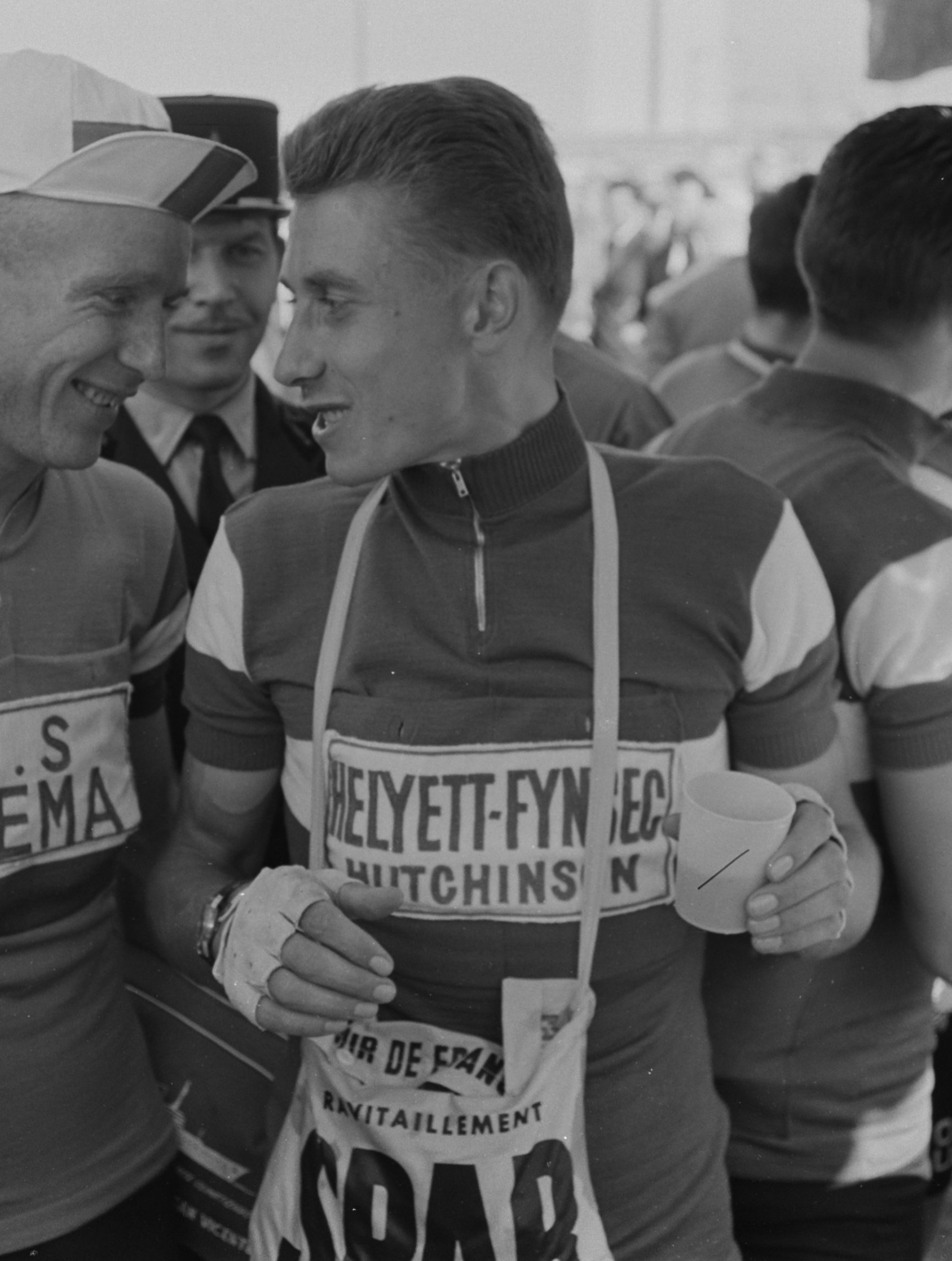 Charlie Gaul, Ab Geldermans bij het menubord, Piet van Est in gesprek met Anquetil.